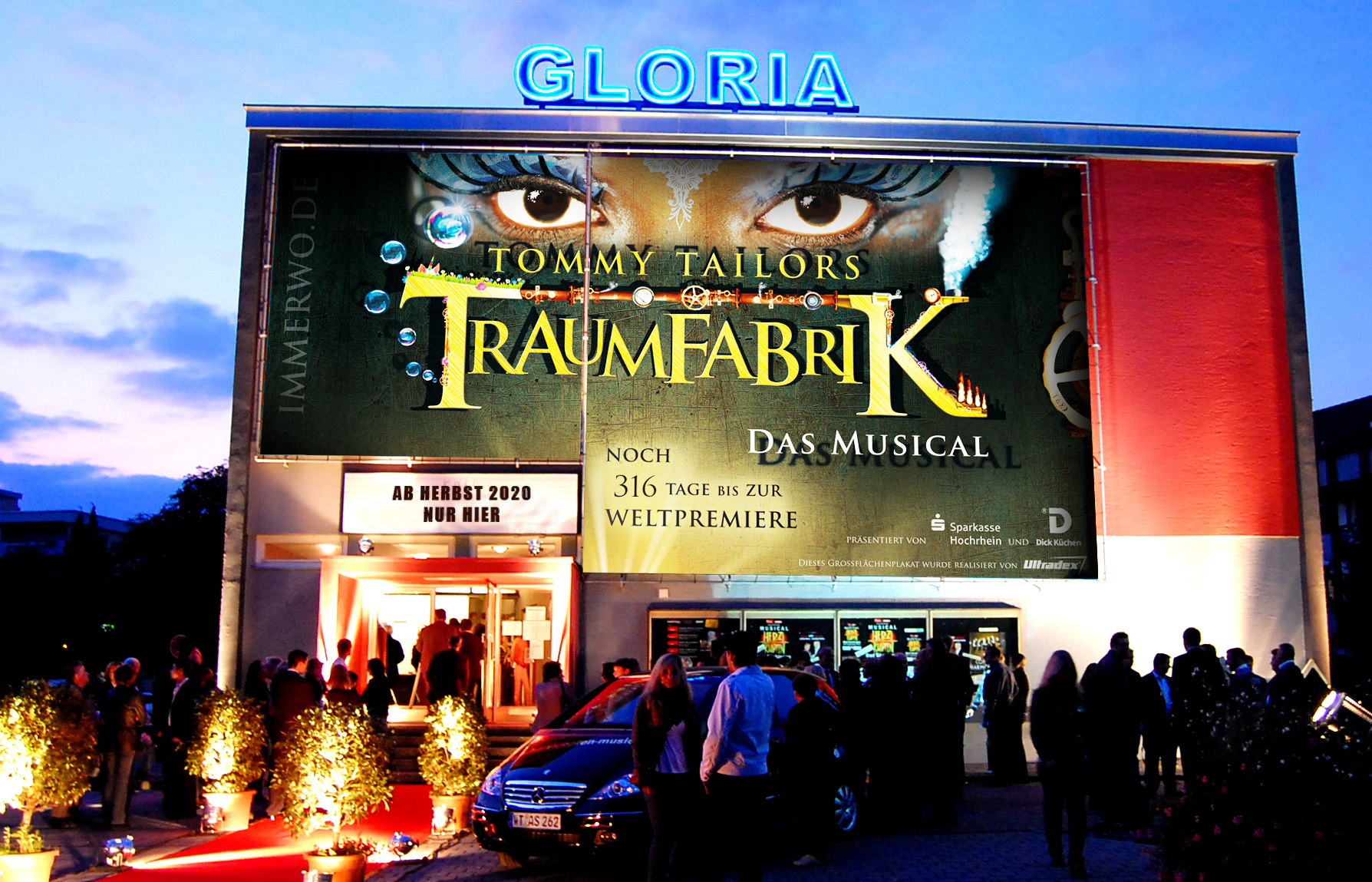 Das Gloria-Theater in Bad Säckingen von außen in der Dämmerung. Gäste stehen vor dem Theater um hineinzugelangen.